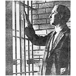 Frederick Cook in carcere